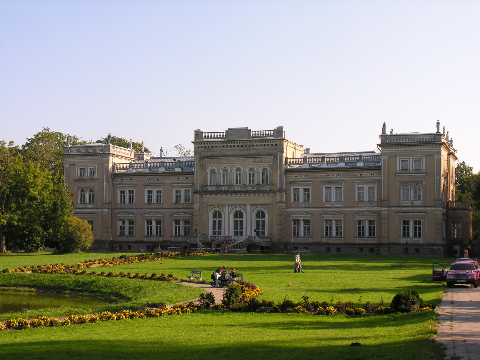 Palacio de Oginskiai en Plungė. Lituania